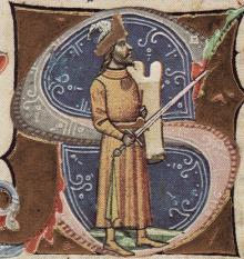 Kond, Hungarian tribal captain.